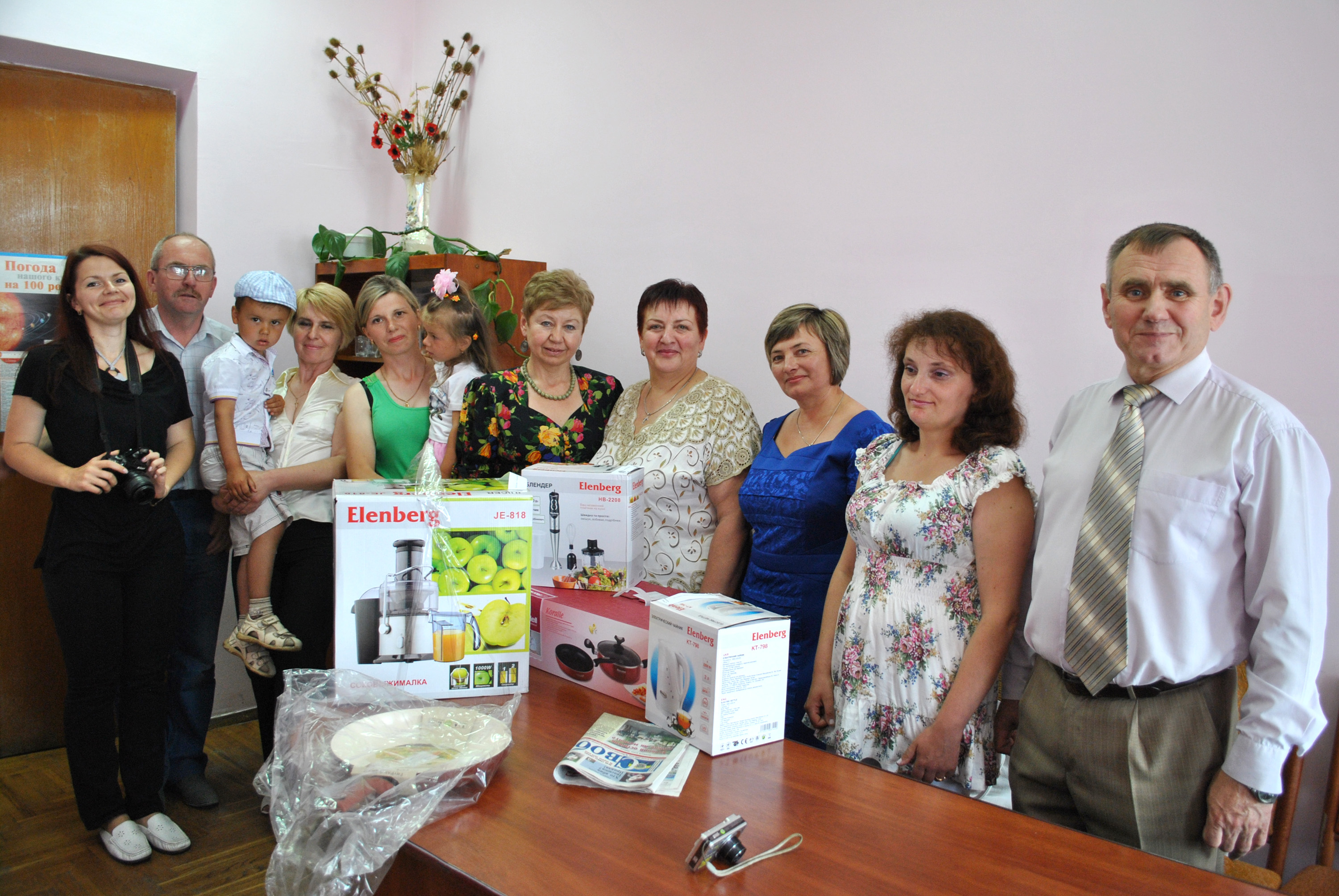 Вручення призів переможцям-читачам газети «Свобода» в редакції газети. Другий зліва — редактор Михайло Лисевич, крайній справа — заступник головного редактора Богдан Новосядлий.